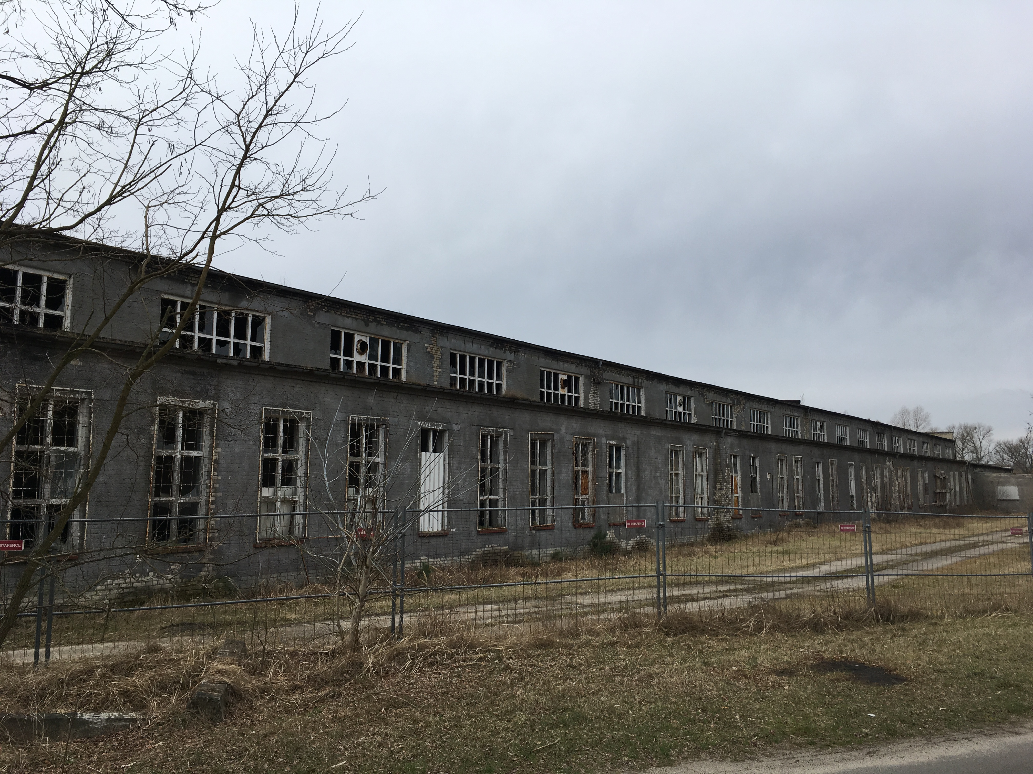 Der Historischer Rundweg durch die Verbotene Stadt ist ein rund 11 km langer Rundweg in Zossen. Er erschließt die Waldstadt, in der 1910 ein Kaiserlicher Truppenübungsplatz entstand. Er wurde 1935 vom Oberkommando des Heeres und ab 1945 von der Gruppe der Sowjetischen Streitkräfte in Deutschland genutzt.